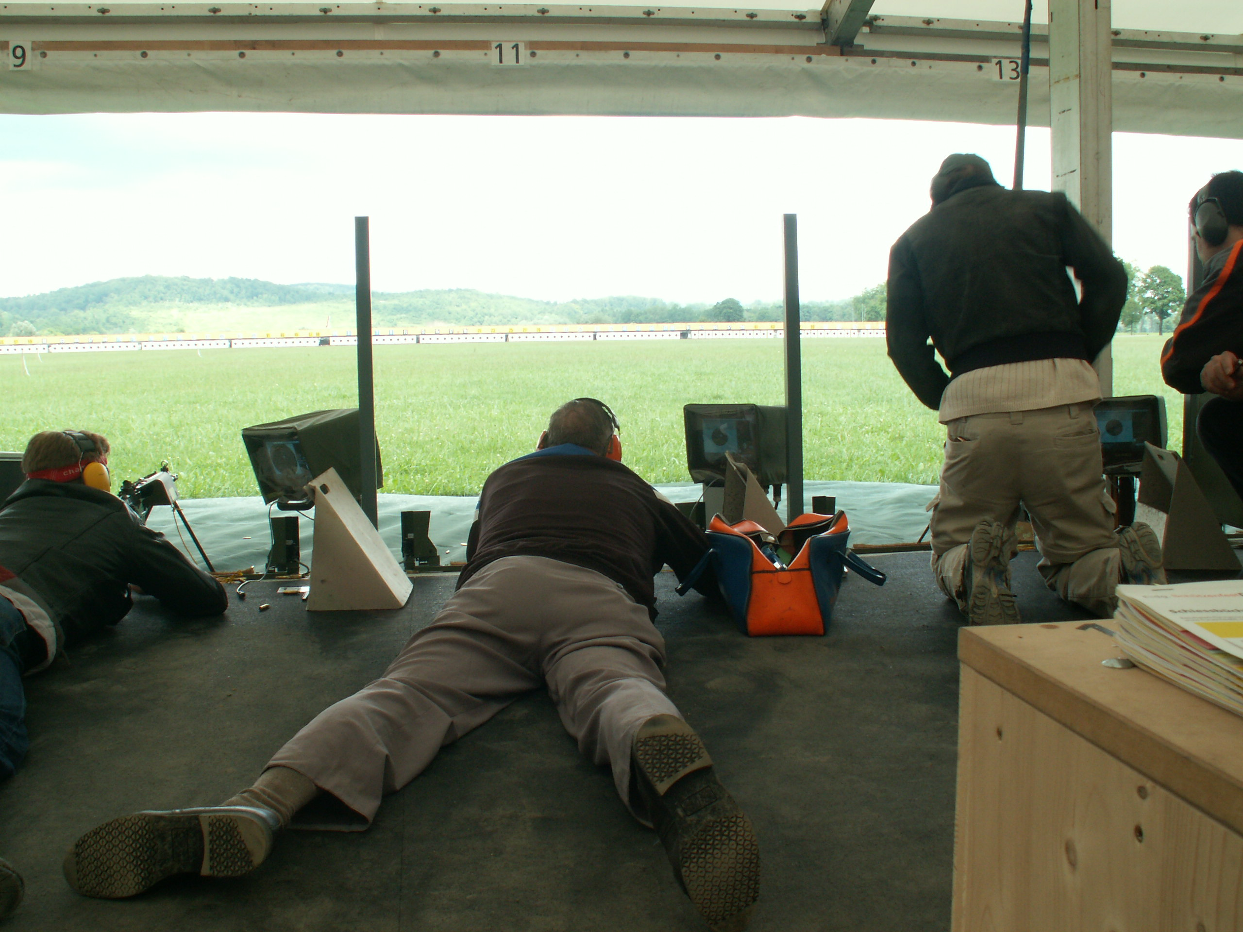 Schütze beim Schiessen auf 300m (Eidg. Schützenfest Frauenfeld 2005)